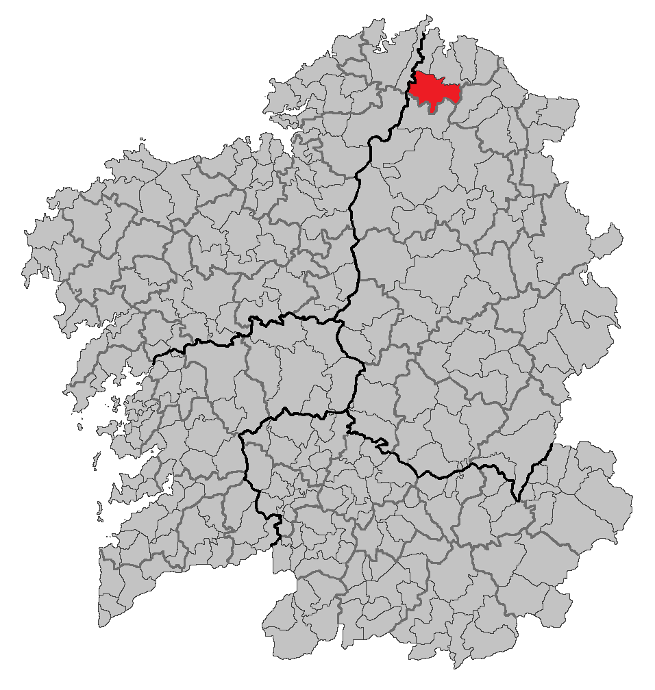 Mapa coa localización do concello de Ourol.